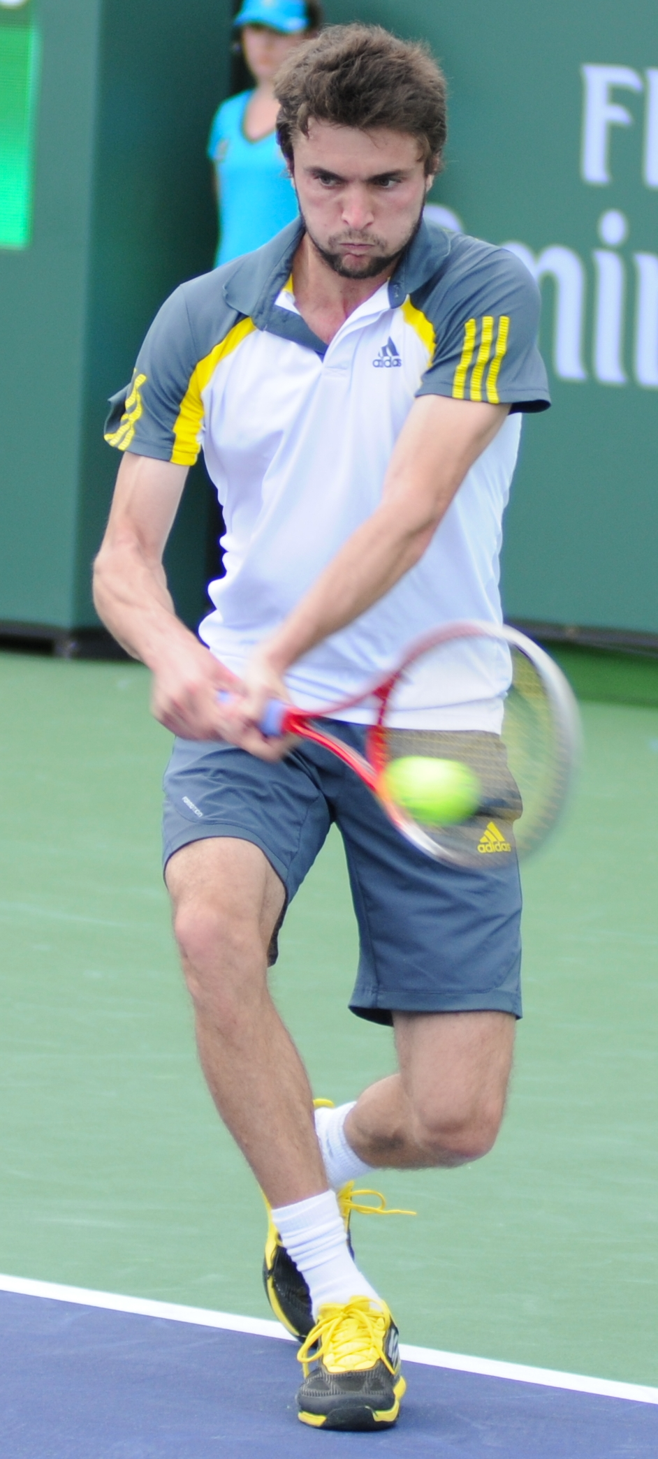 2013 BNP Paribas Open